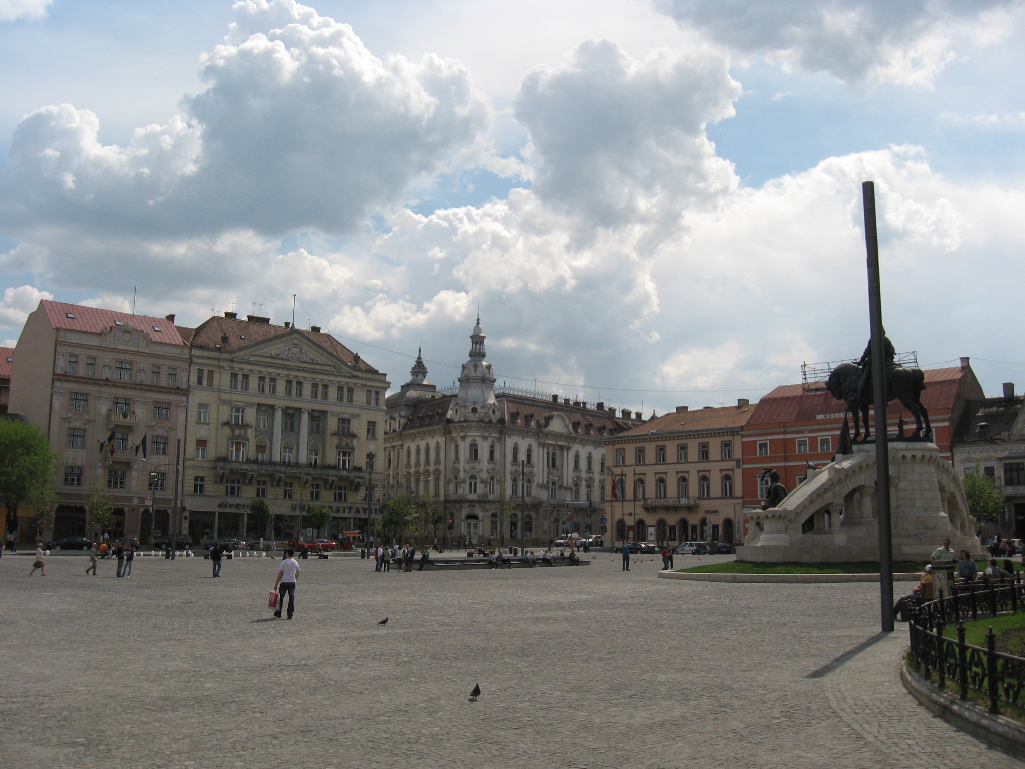 Cluj-Napoca, Piaţa Unirii